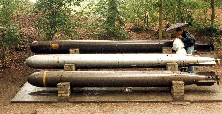 Amerikanische, deutsche und englische Torpedos aus dem 2. Weltkrieg. Oben: MK IX, 1200 kg (GB) Mitte: deutsches G7e, 1400 kg mit elektrischem Antrieb; Unten: MK18, 1378 kg (USA, Nachbau des deutschen G7e), von dem ein Exemplar im Dezember 1941 erbeutet werden konnte; Standort: Kriegs- und Widerstandskämpfermuseum der Niederlande (Overloon)